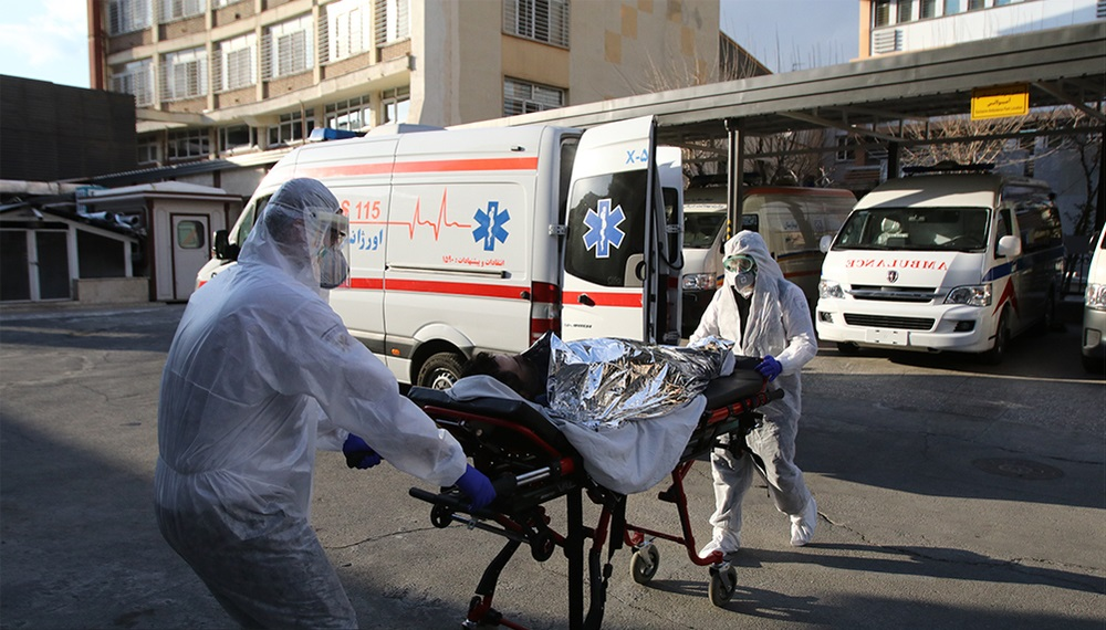 نیروهای خستگی ناپذیر اورژانس